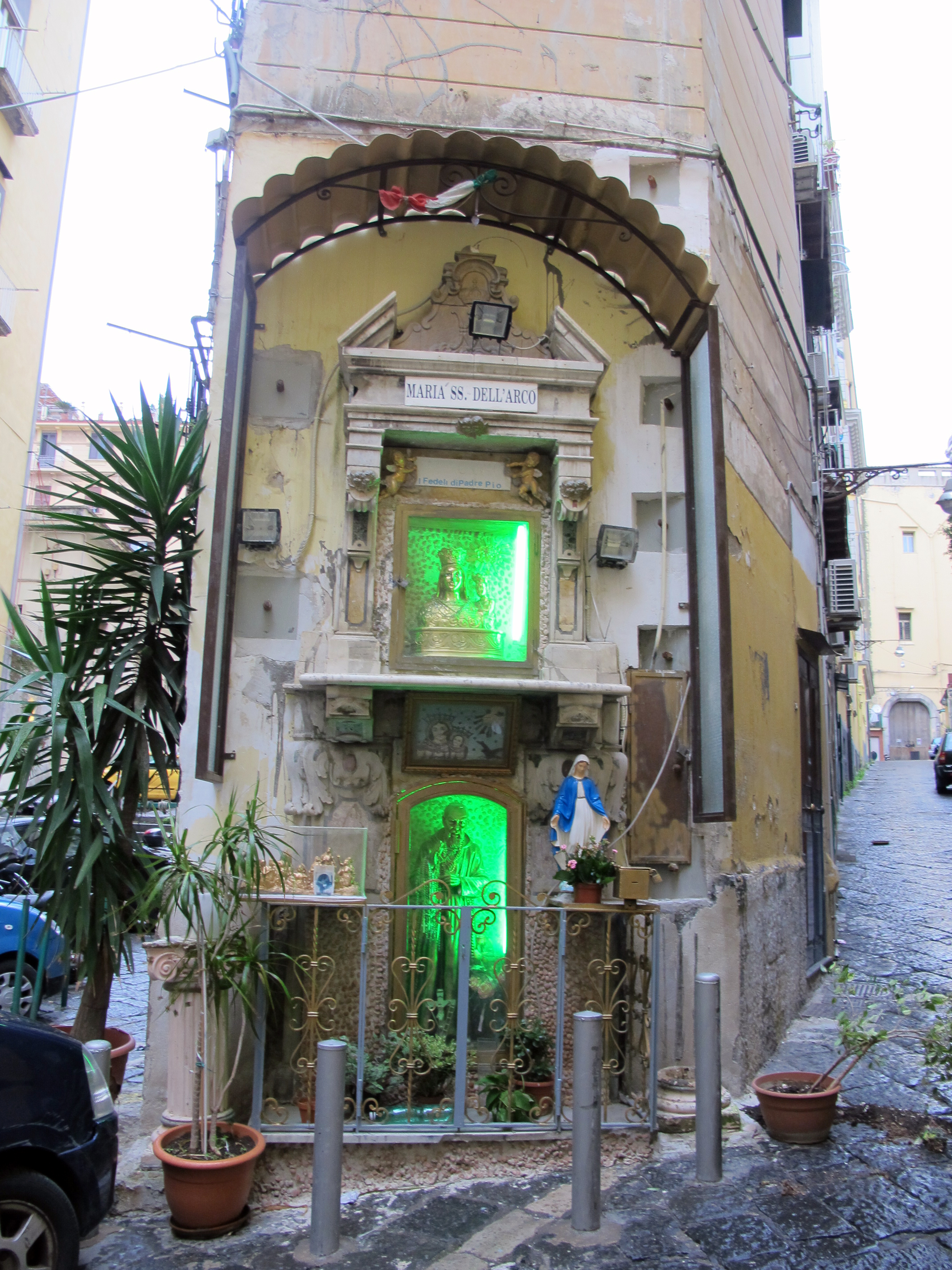 Napoli